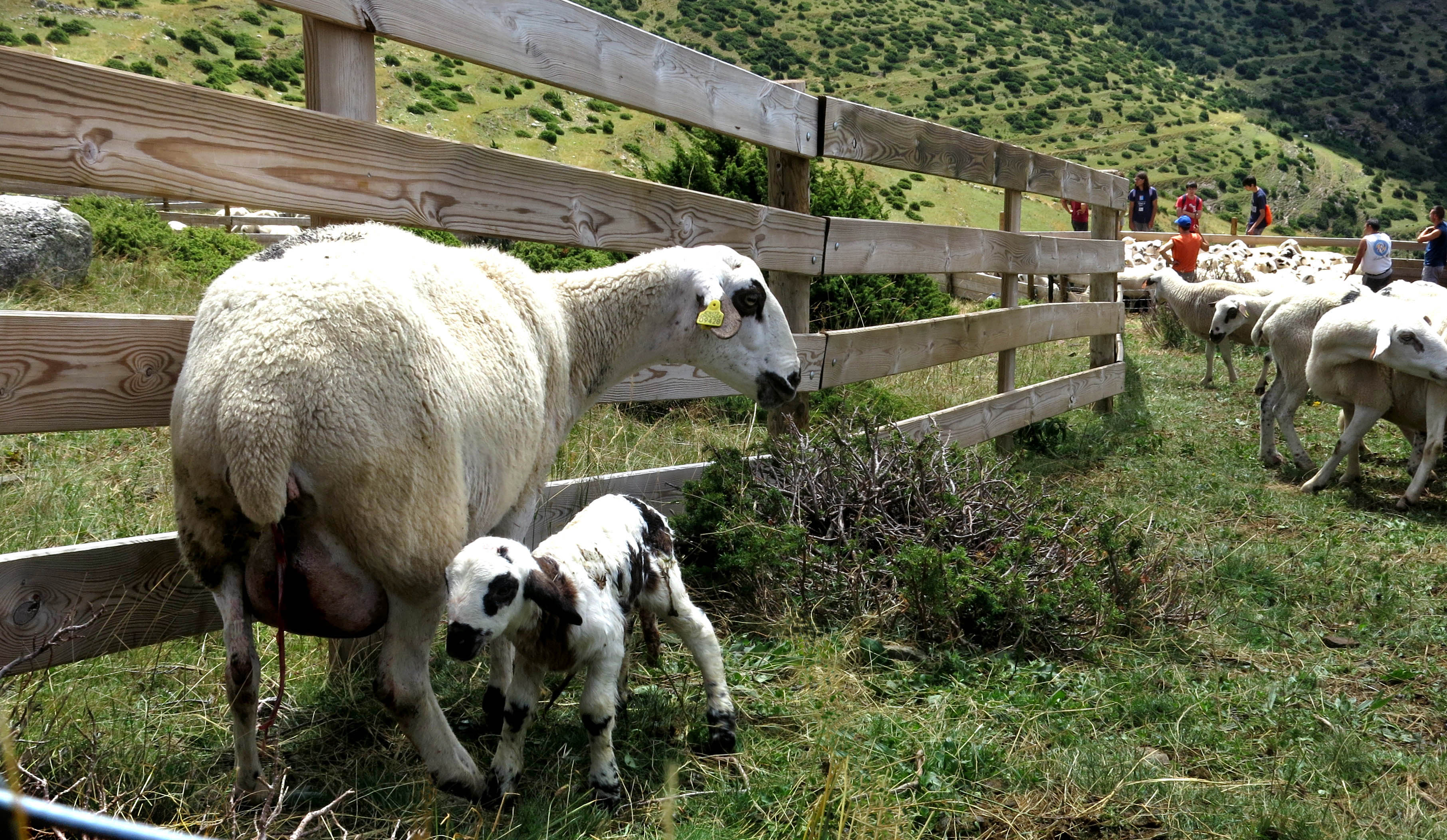 Imatge de la Tria a la serra de Sis (Baixa Ribagorça)